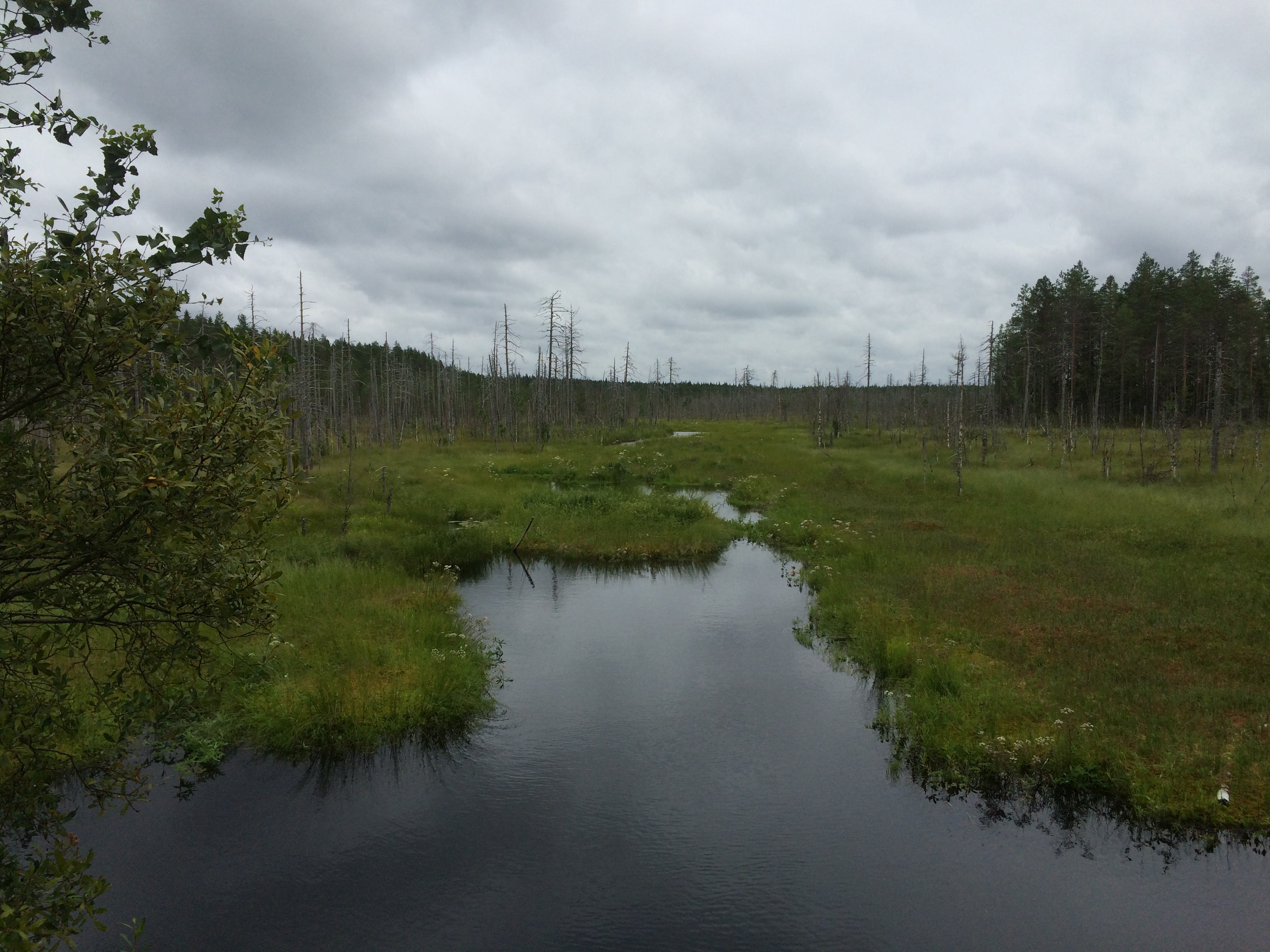 Сяюнейоки